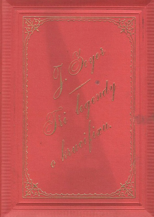 Tři legendy o krucifixu, vydání z roku 1895